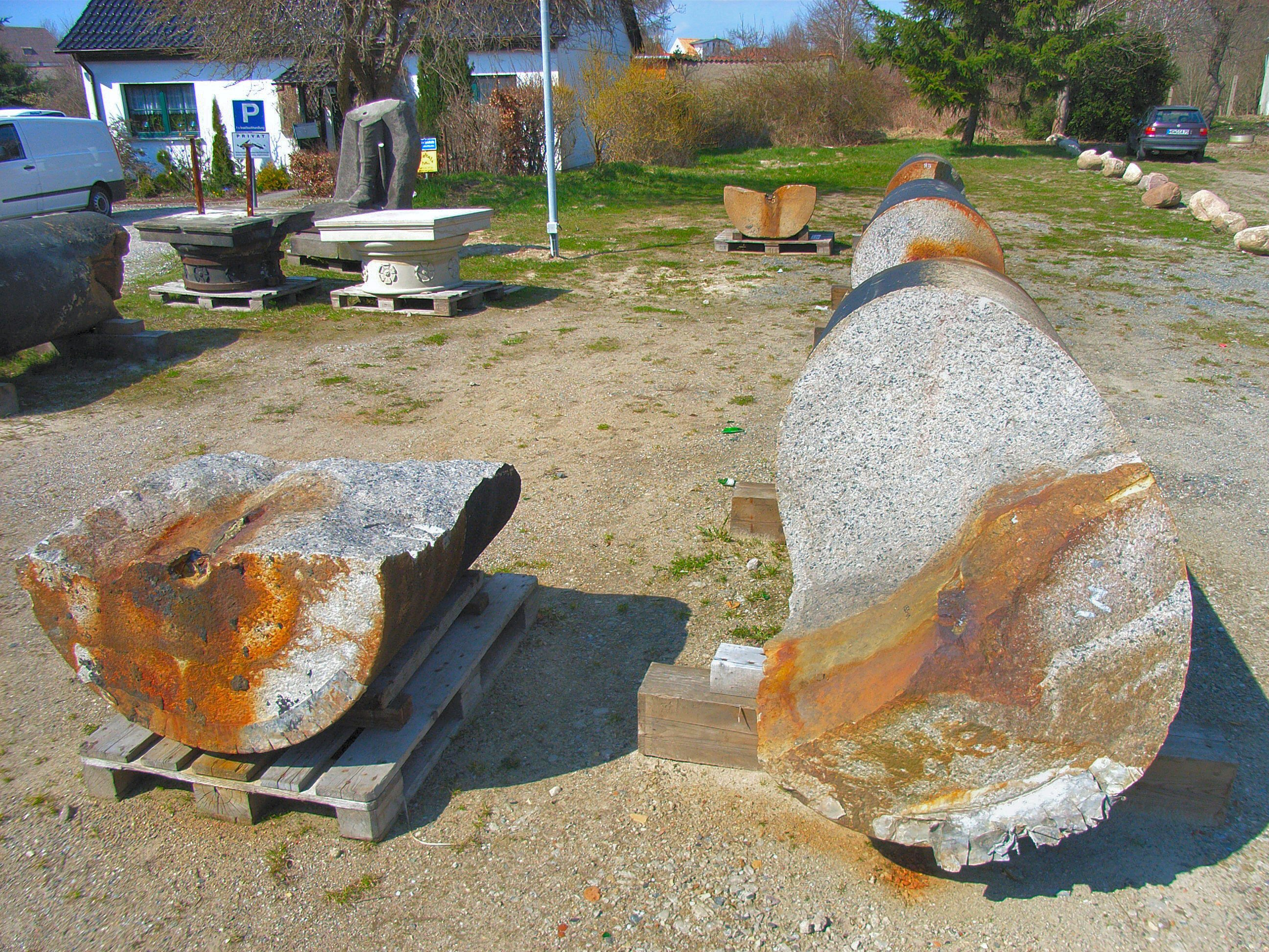 Vom Rost gesprengte Säulentrommel der Preußensäulen auf dem Lagerplatz in der Alleestraße von Putbus im April 2006